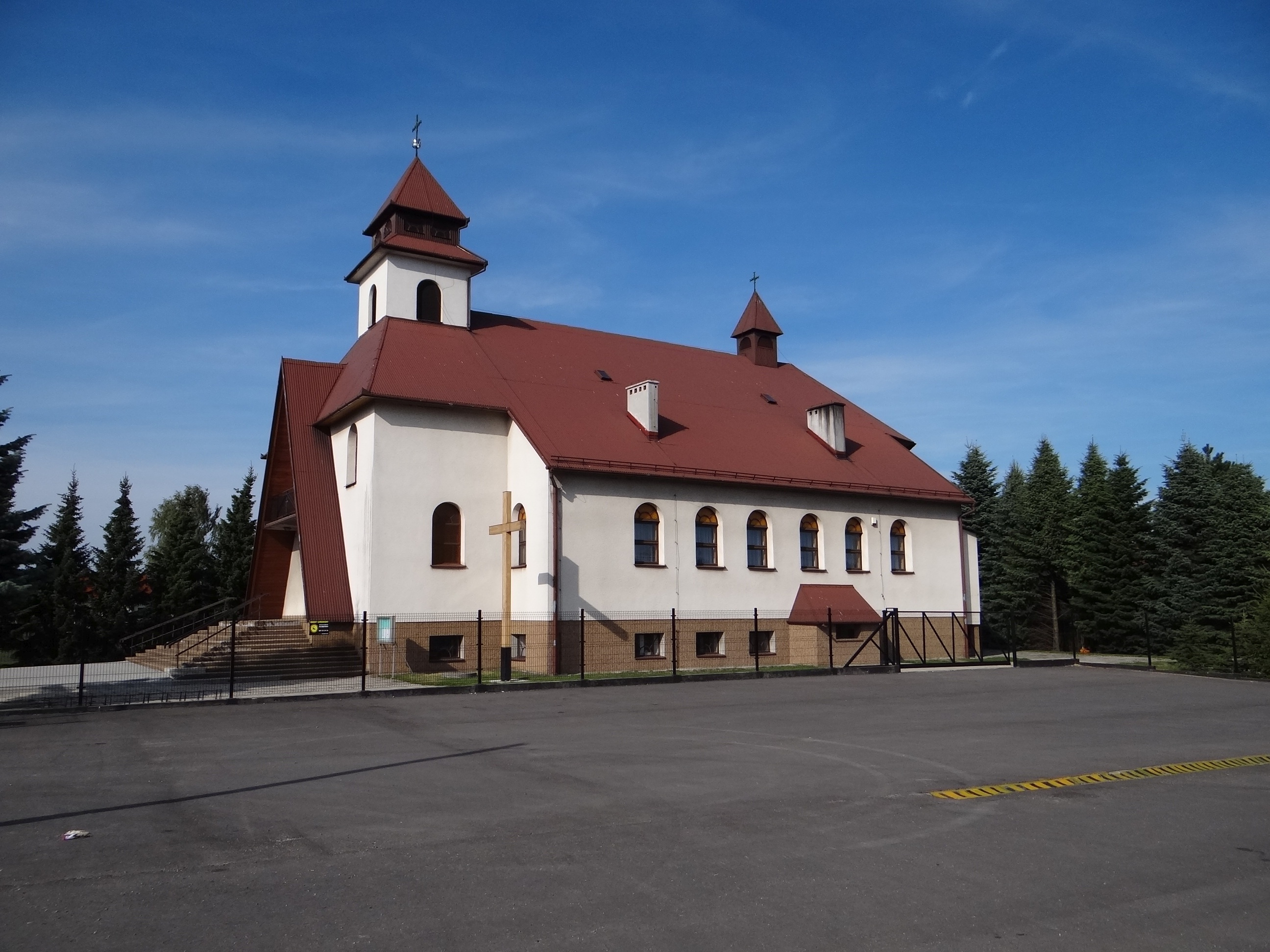 Kościół w Wieprzu